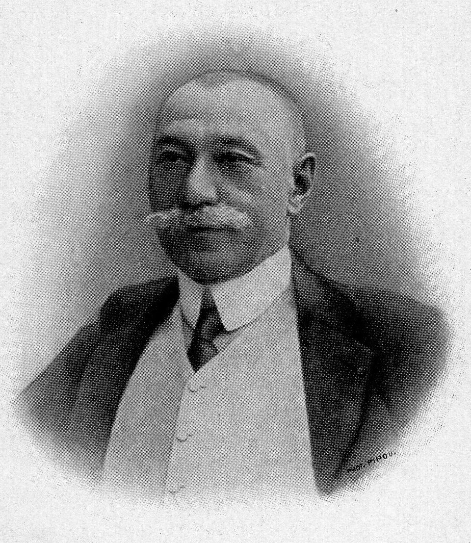 Foto del Prof. Poncet, docente di Clinica Chirurgica presso la facoltà di Medicina di Lione.